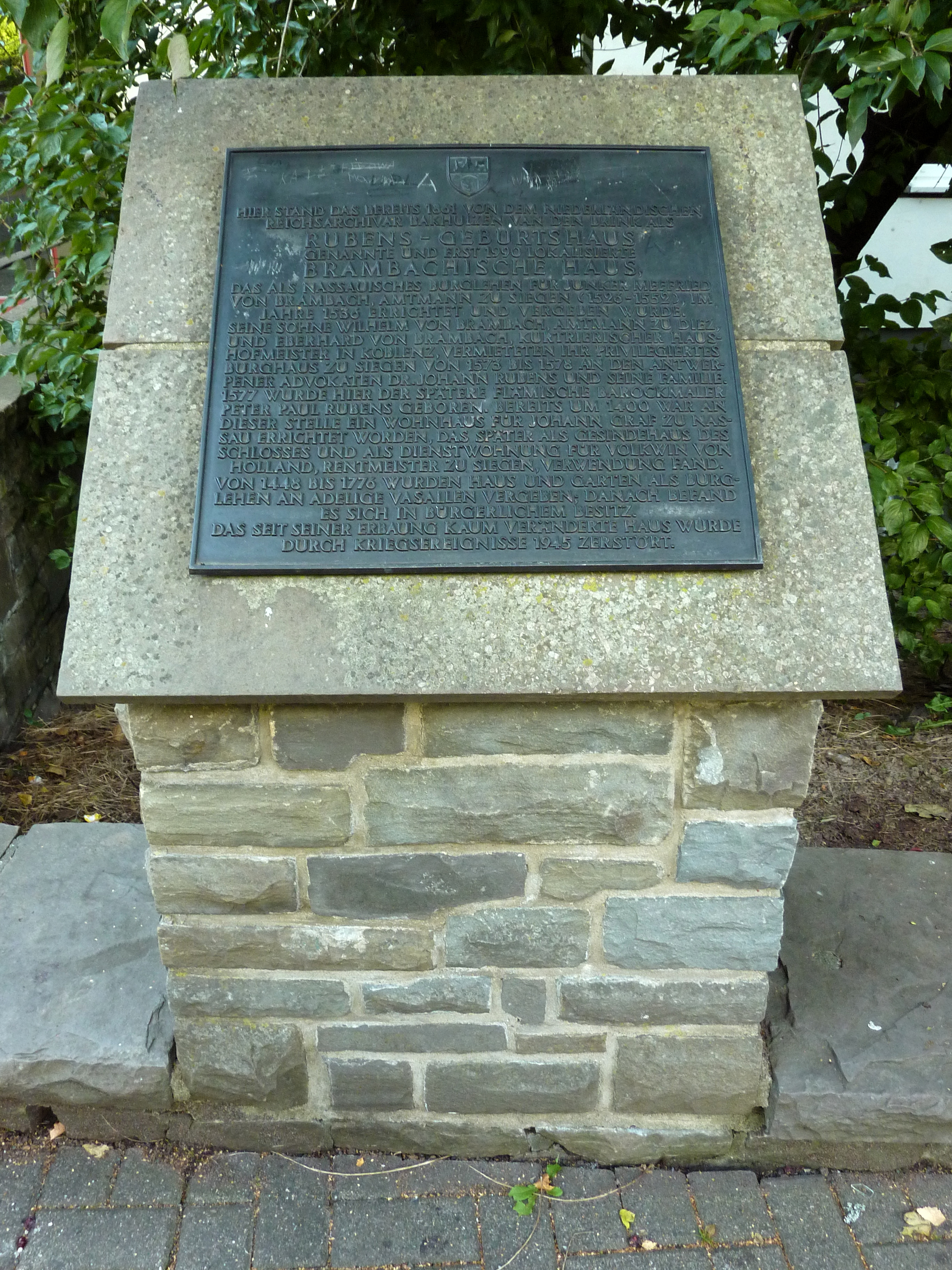 Stadt Siegen in Nordrhein-Westfalen, Bundesrepublik Deutschland: Stele mit Gedenktafel auf dem Gelände der ehemaligen Burgfreiheit des Oberen Schlosses, an der Stelle des Geburtshauses von Peter Paul Rubens (1577–1640) Burgstr. 10. Inschrift: Hier stand das bereits 1861 von dem niederländischen Reichsarchivar Bakhuizen van den Brink als Rubens-Geburtshaus genannte und erst 1990 lokalisierte Brambachische Haus, das als nassauisches Burglehen für Junker Meffried von Brambach, Amtmann zu Siegen (1526-1552), im Jahre 1536 errichtet und vergeben wurde. Seine Söhne Wilhelm von Brambach, Amtmann zu Diez, und Eberhard von Brambach, kurtrierischer Haushofmeister in Koblenz, vermieteten ihr privilegiertes Burghaus zu Siegen von 1573 bis 1578 an den Antwerpener Advokaten Dr. Johann Rubens und seine Familie. 1577 wurde hier der spätere flämische Barockmaler Peter Paul Rubens geboren. Bereits um 1400 war an dieser Stelle ein Wohnhaus für Johann Graf zu Nassau errichtet worden, das später als Gesindehaus des Schlosses und als Dienstwohnung für Volkwin von Holland, Rentmeister zu Siegen, Verwendung fand. Von 1448 bis 1776 wurden Haus und Garten als Burglehen an adelige Vasallen vergeben; danach befand es sich in bürgerlichem Besitz. Das seit seiner Erbauung kaum veränderte Haus wurde durch Kriegsereignisse 1945 zerstört.